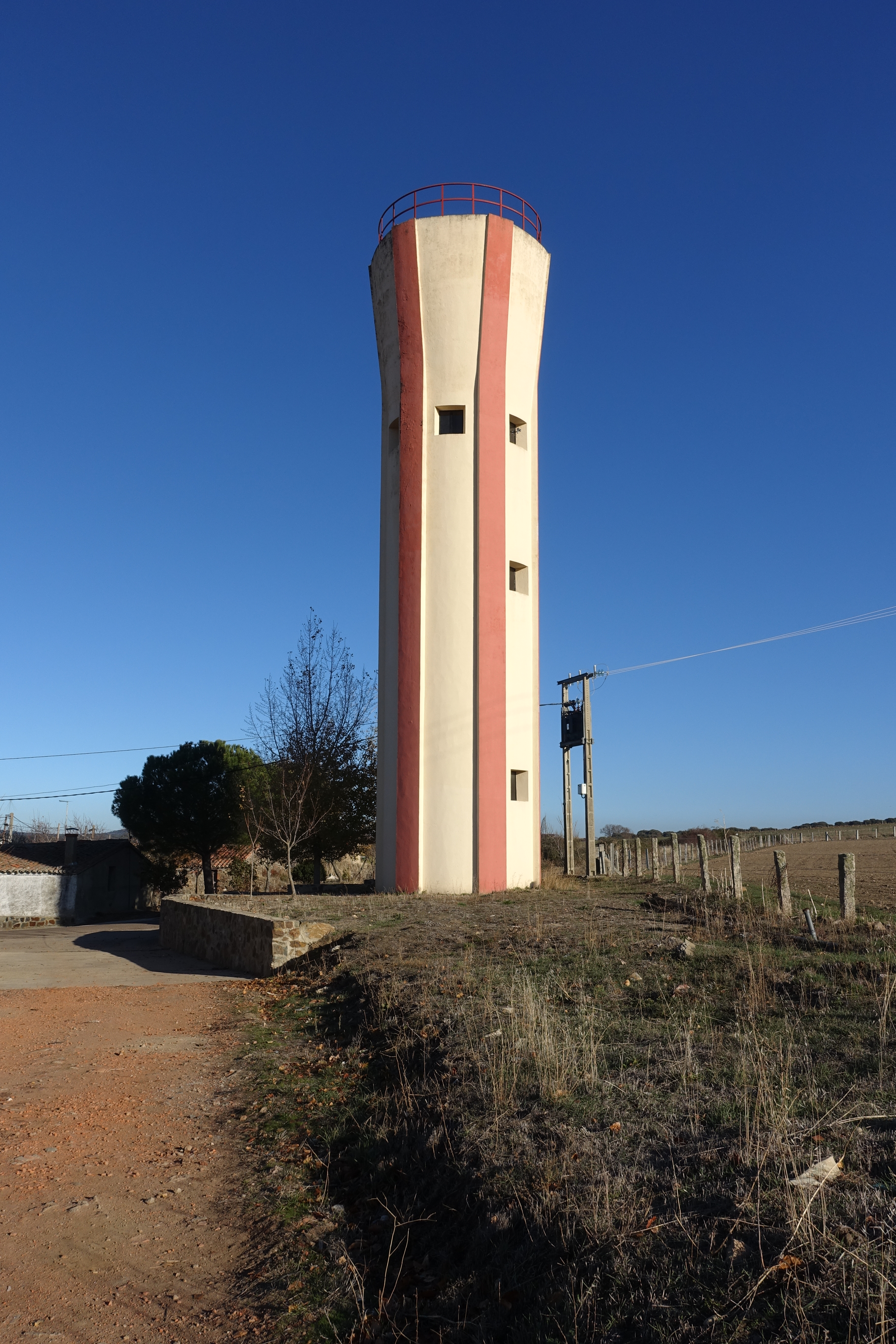 Depósito de agua en Sanchón de la Sagrada (Salamanca, España).